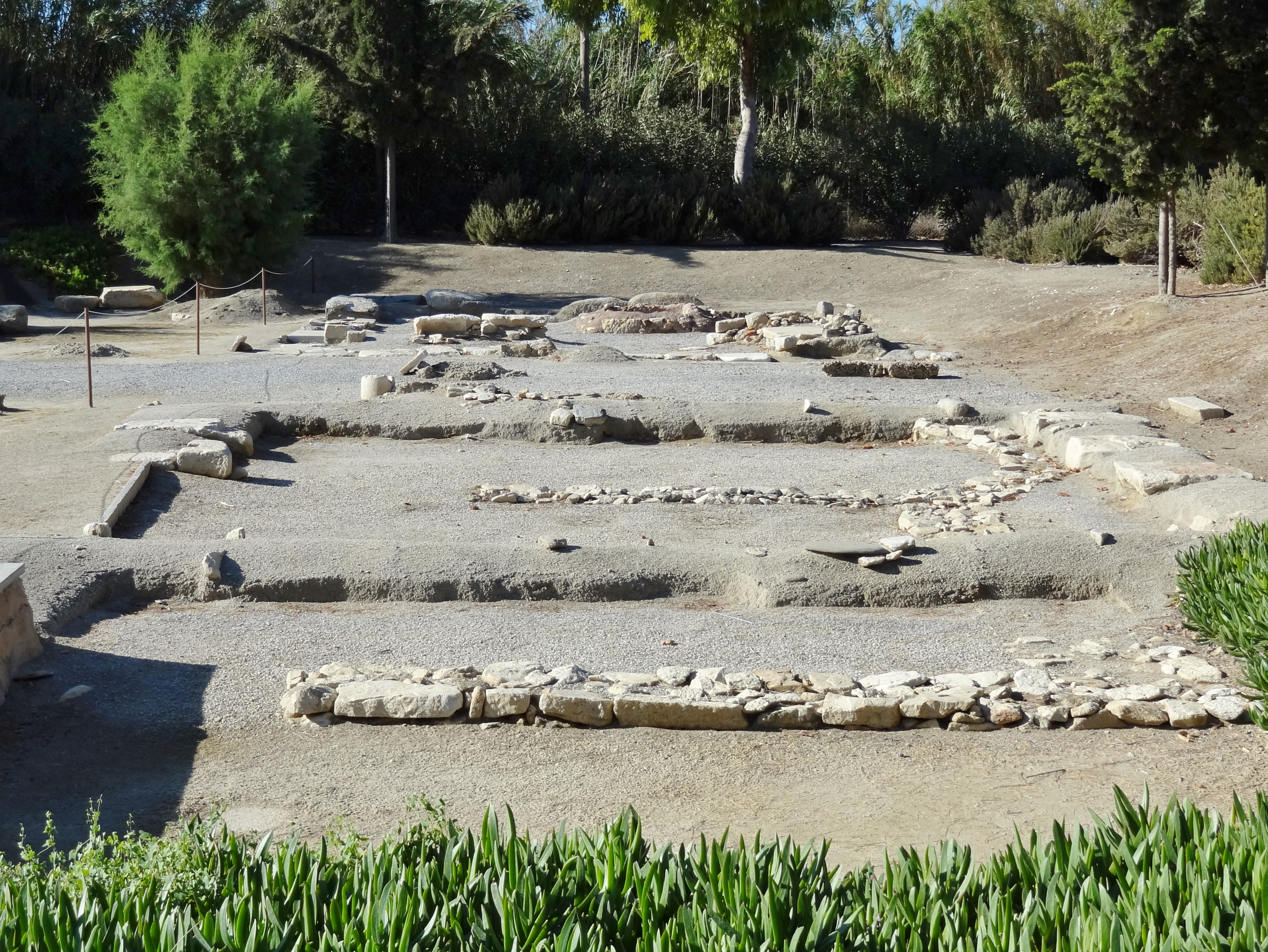 Propylon und Festsaal (Hestiatorion) auf dem Gelände des Tempels des Dionysos von Yria auf Naxos, Kykladen, Griechenland